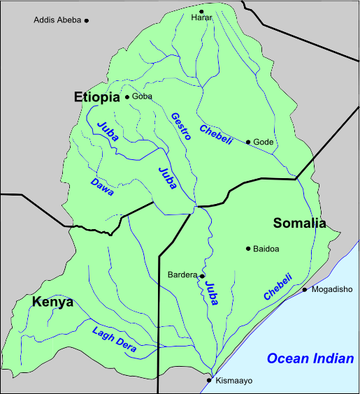 Bacin de Juba.